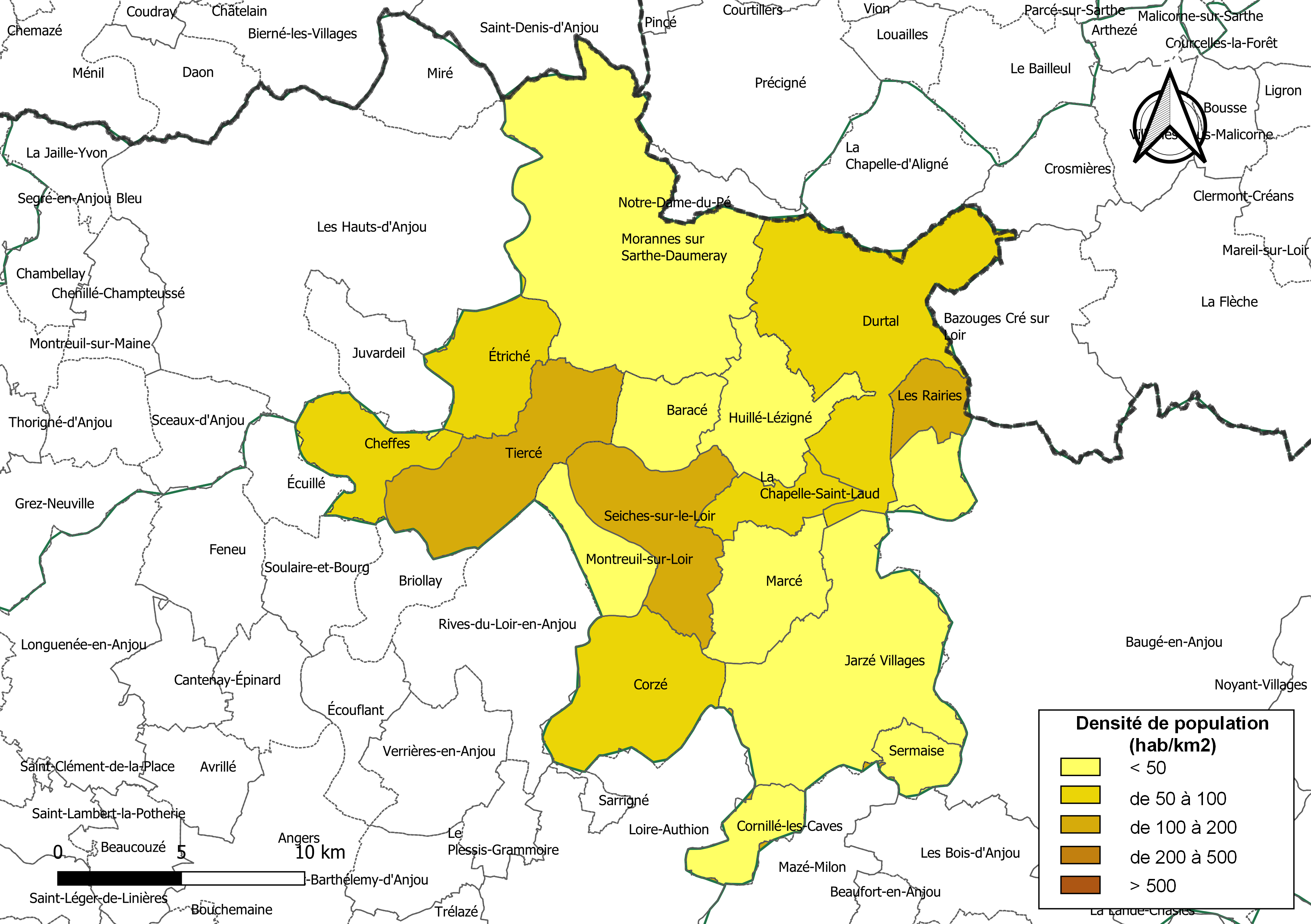 Carte des densités de population (millésimée 2016) des communes de la Communauté de communes Anjou Loir et Sarthe, département de Maine-et-Loire, France. Composition au 1er janvier 2019.